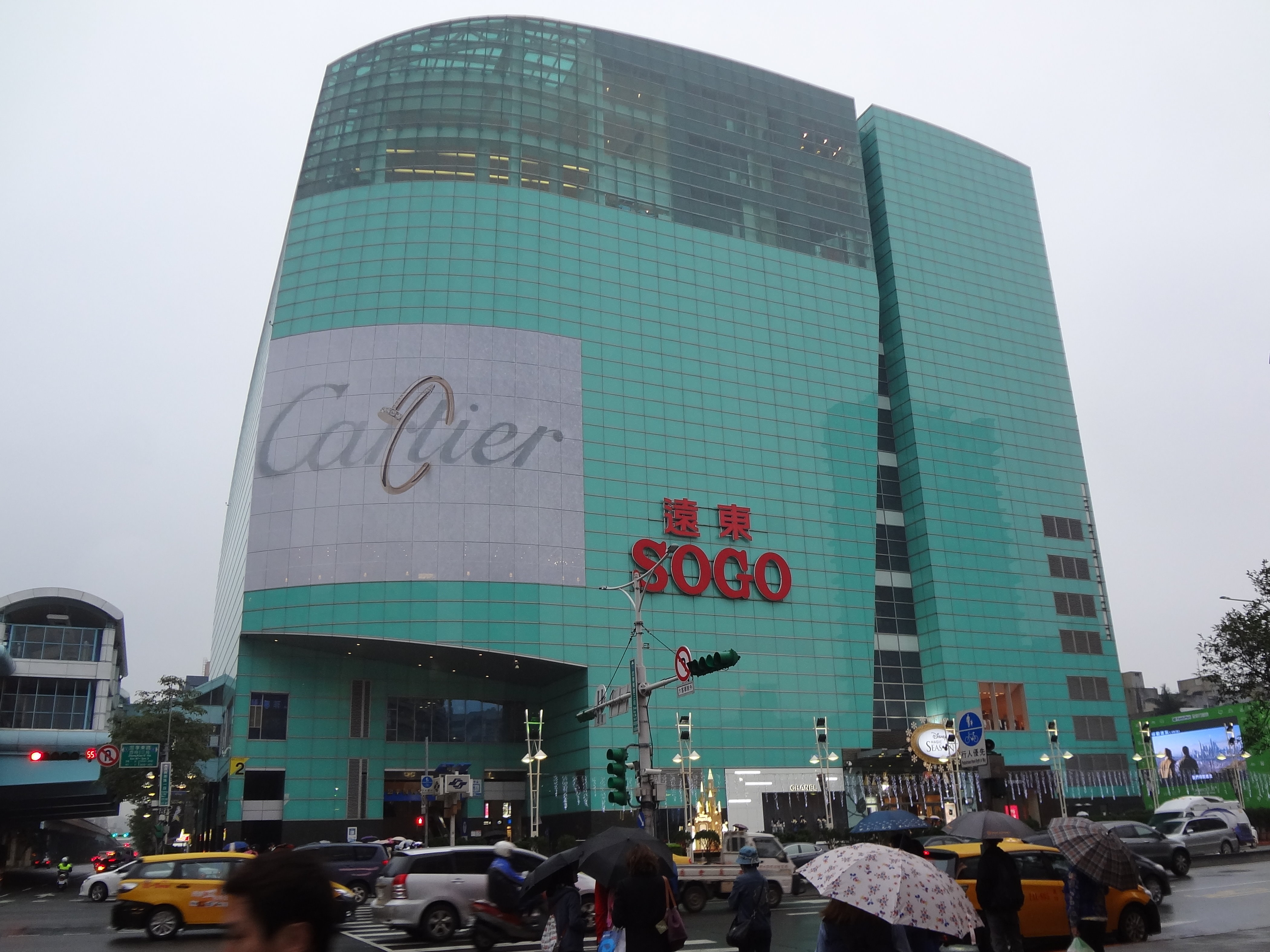 遠東SOGO百貨台北復興館，地址：臺北市大安區忠孝東路三段300號。